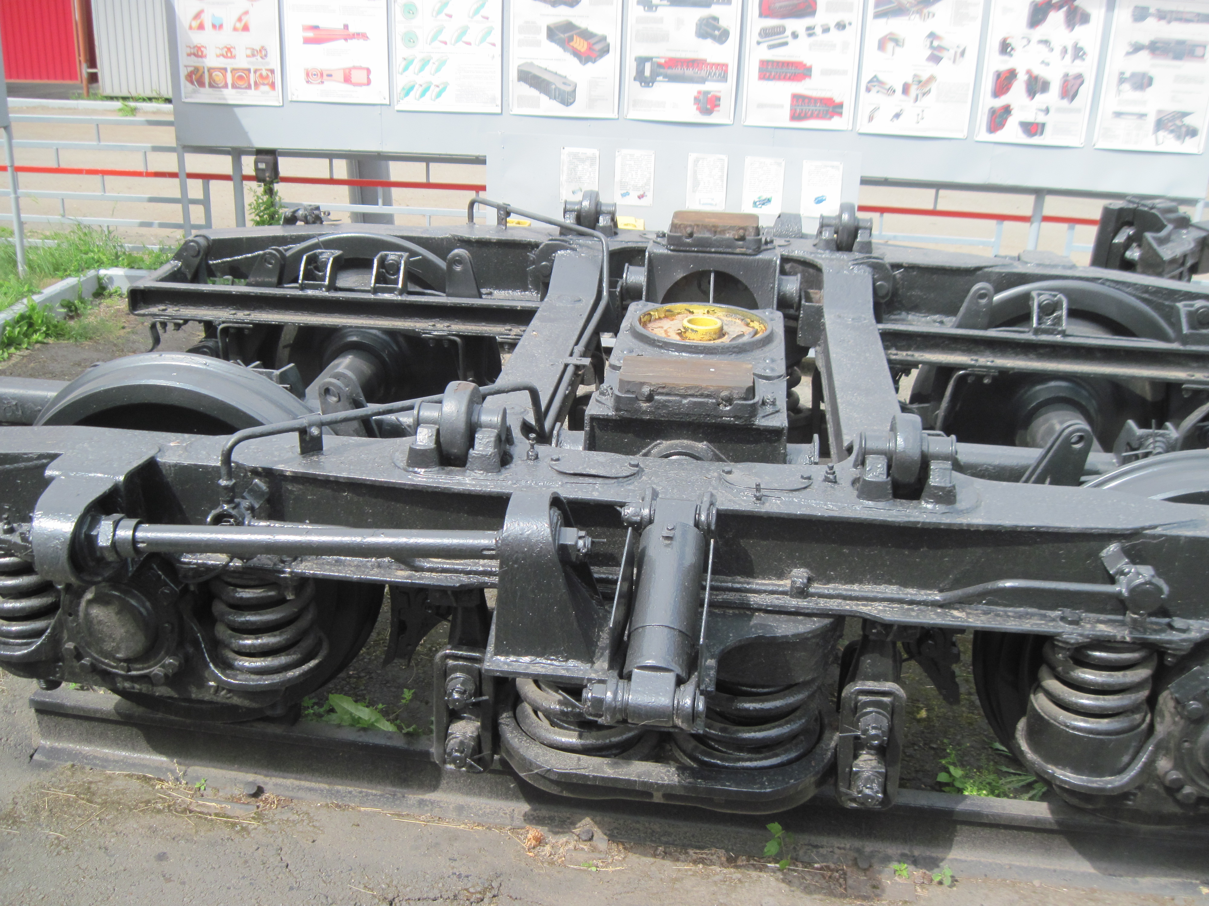 Тележка пассажирского вагона